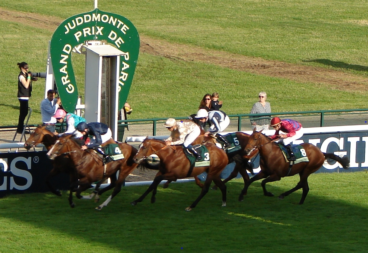 600000€ pour le N°4 Imperial monarch monté par JP. O'Brien (fils de l’entraîneur Aidan P. O'Brien), vainqueur de l'arrivée du Grand Prix de Paris 2012 à l'hippodrome de Longchamp